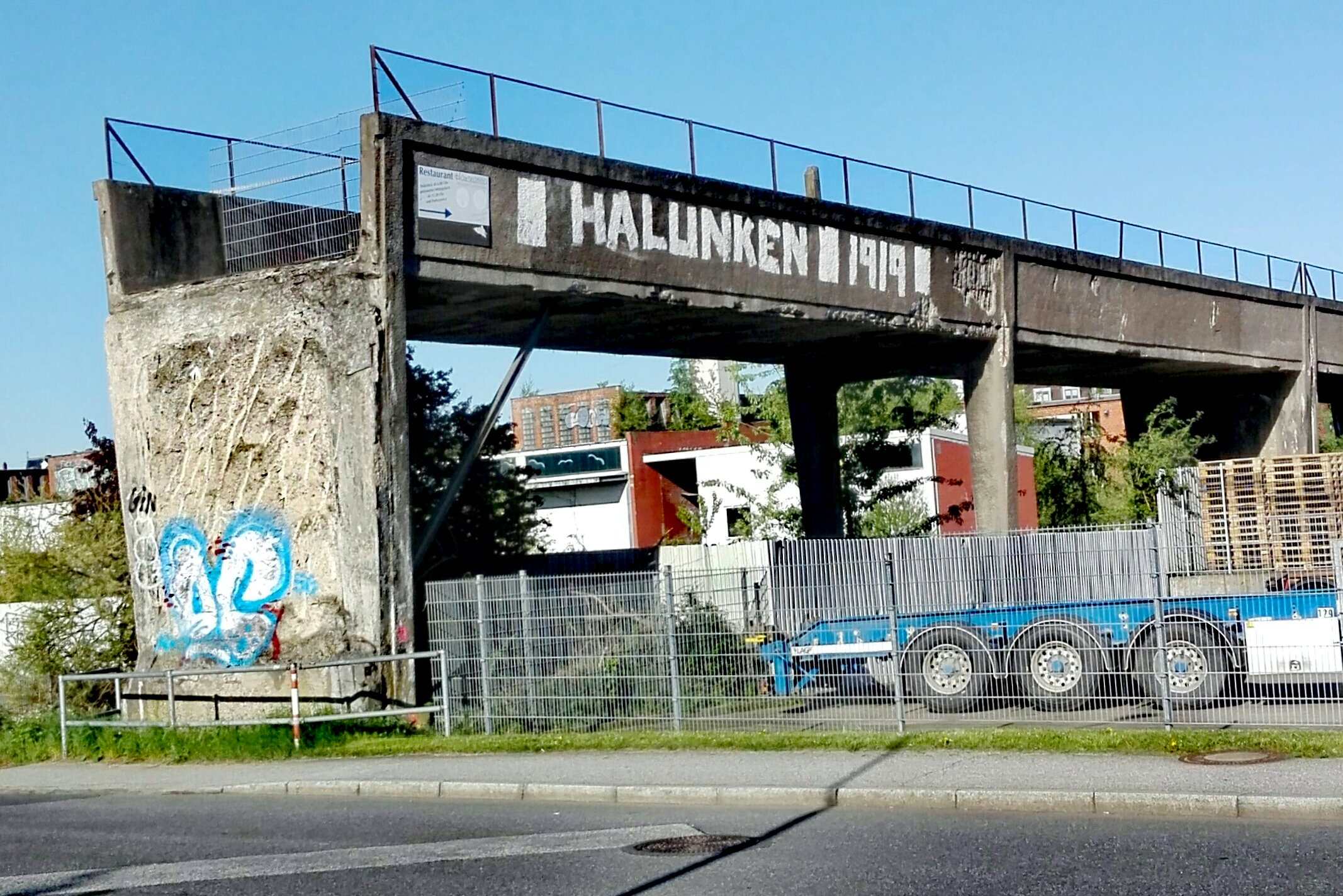 Blick auf die Reste des Hochtrifts vom Seegrenzschlachthof.